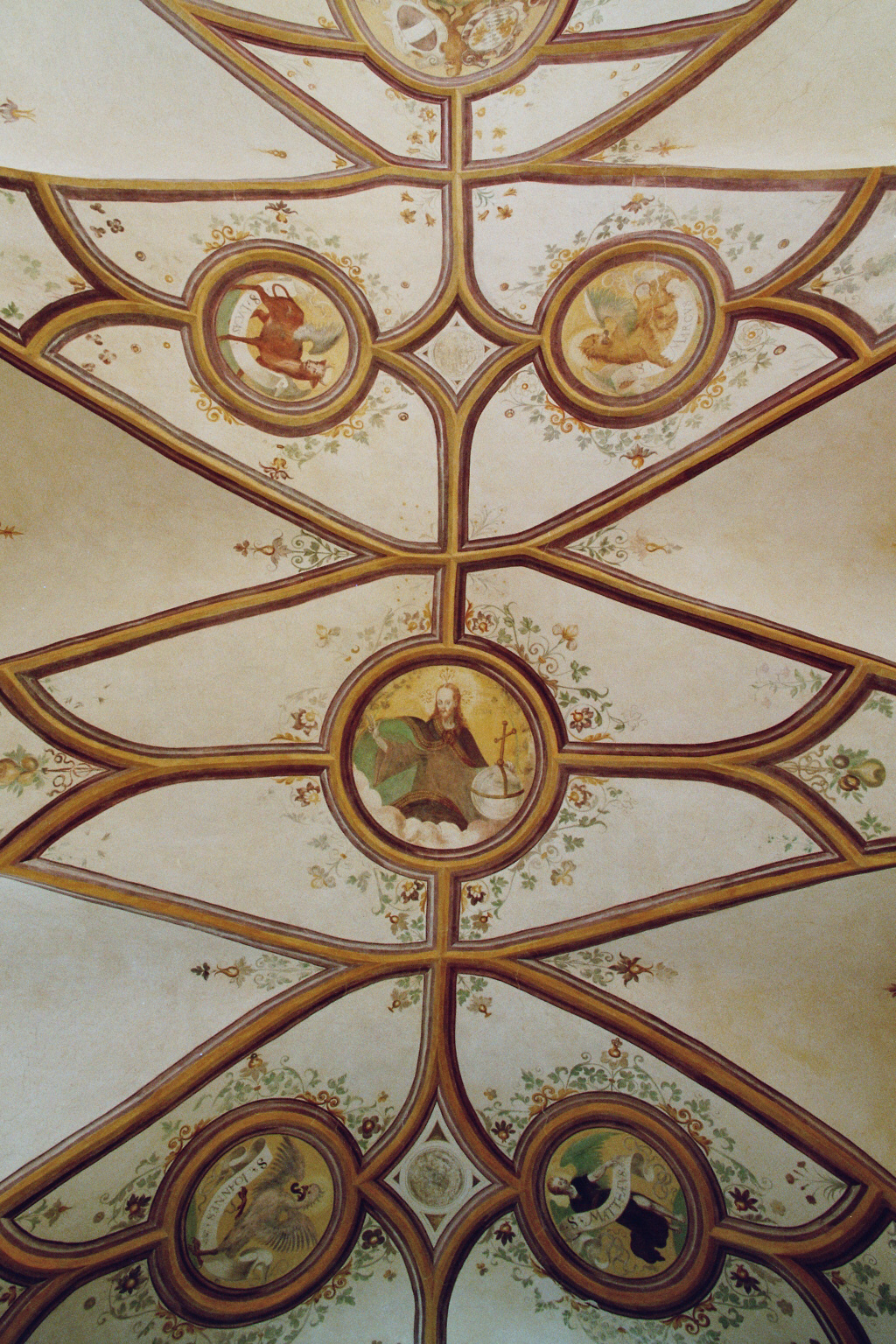 Kapelle St. Walburgis, Seeon Langhausgewölbe Restaurator: Johann Brunner, Surberg Erstellungsjahr: 2006